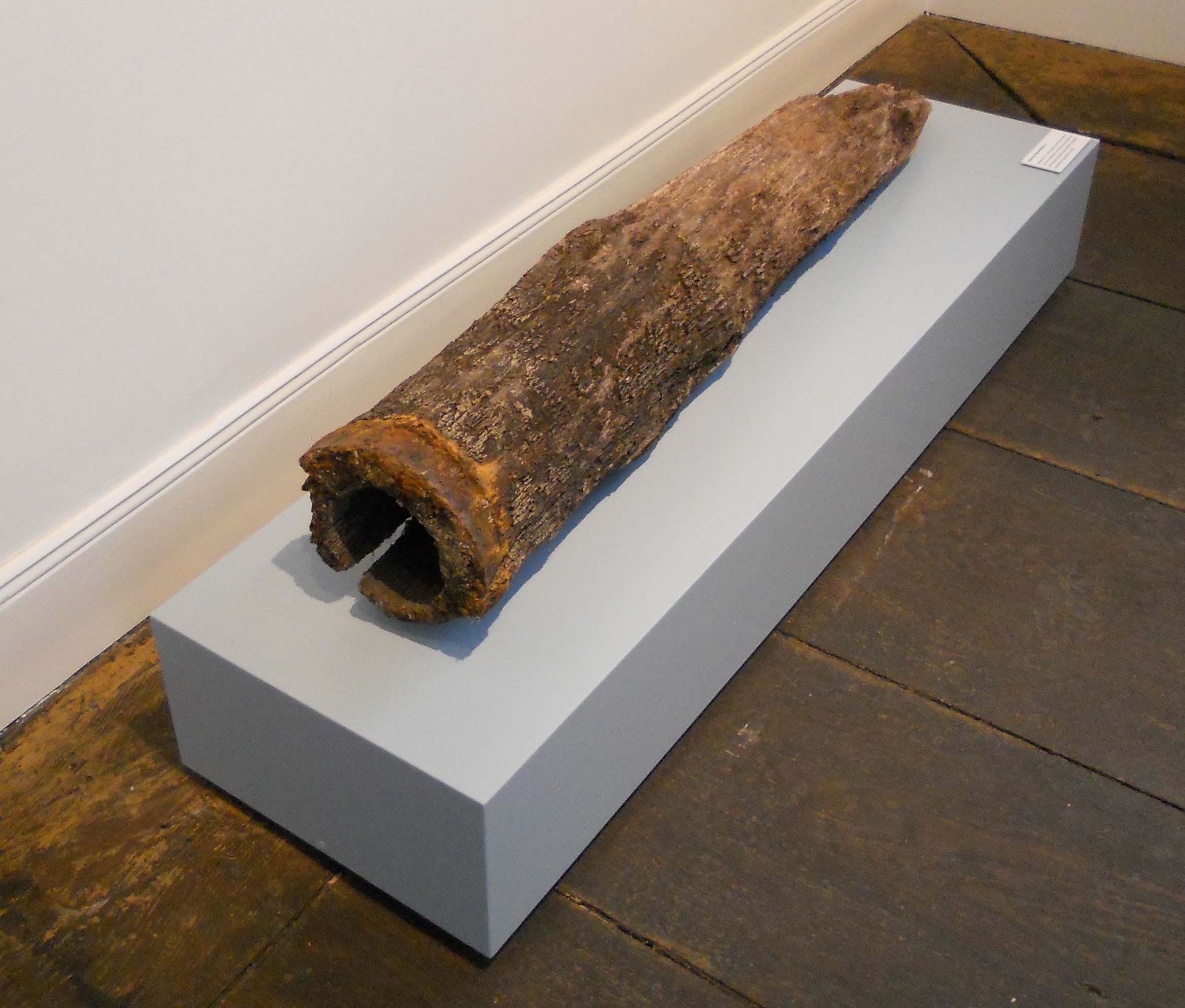 Stück einer Holzwasserleitung, mit der ein Brunnen am Markt gespeist wurde